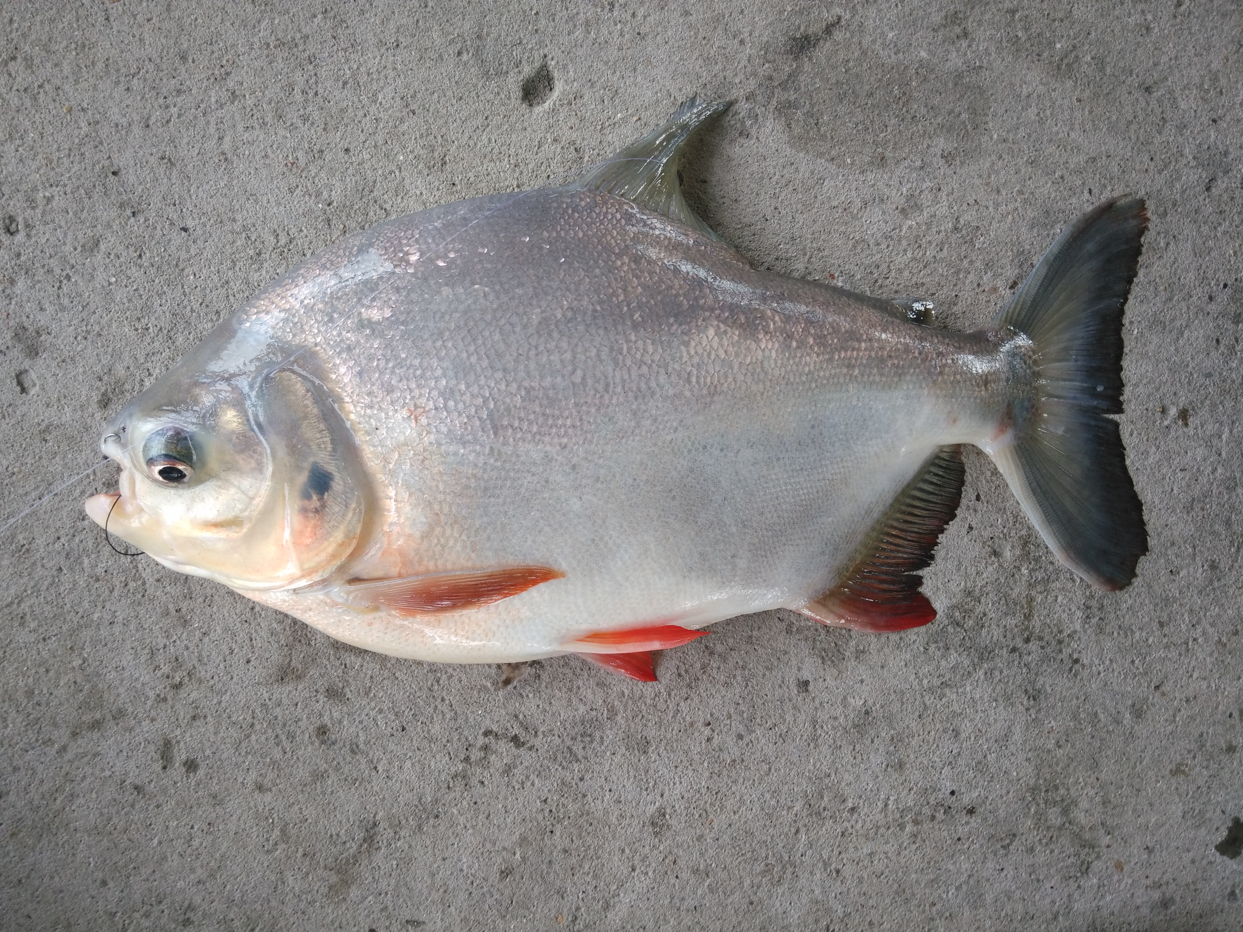 Hình tự chụp một con cá chim nước ngọt bằng di động cá nhân